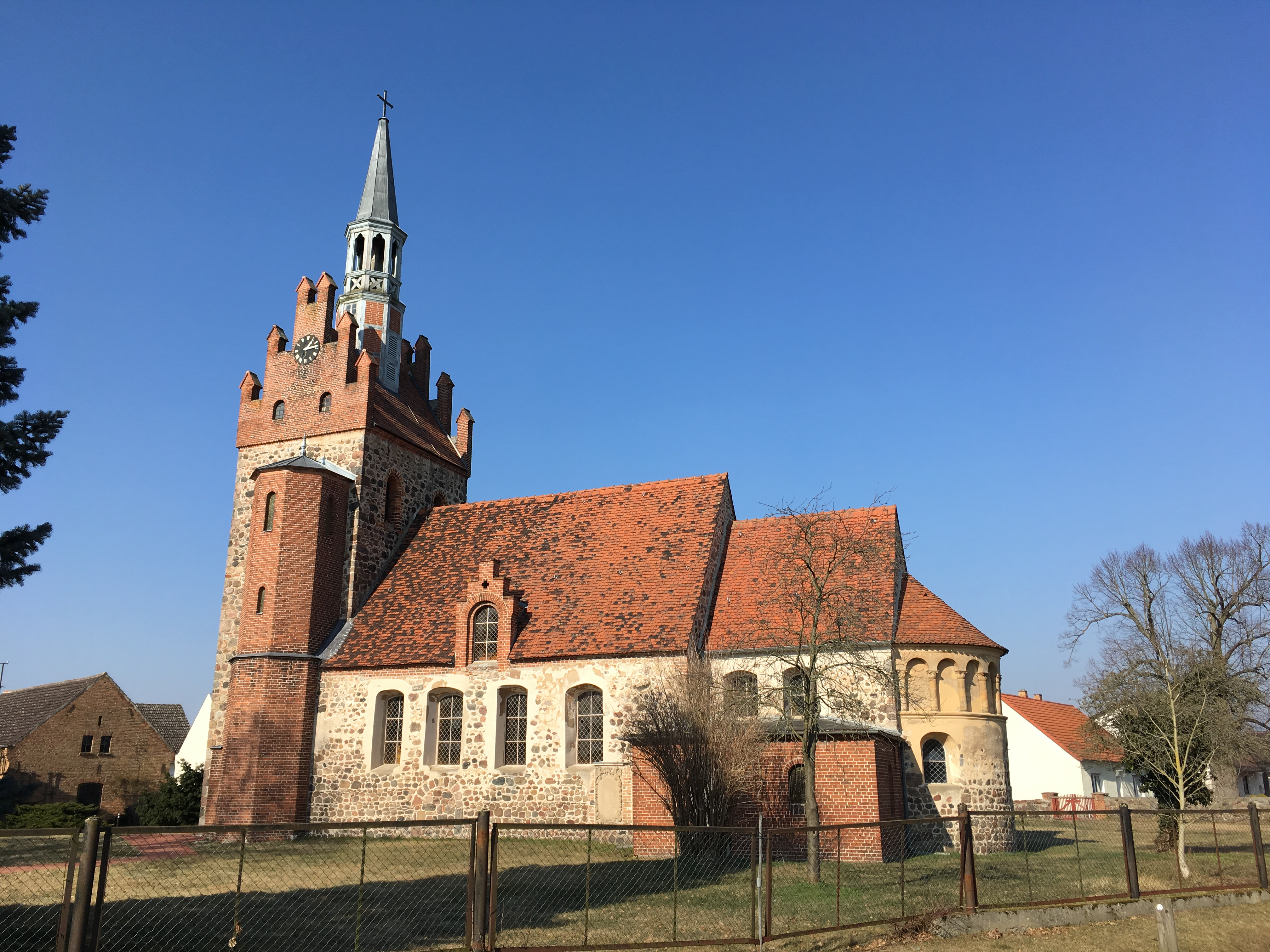 Die Dorfkirche Wittbrietzen der Stadt Beelitz im Land Brandenburg ist eine spätromanische Feldsteinkirche, die in den Jahren 1226 bis 1250 erbaut wurde.